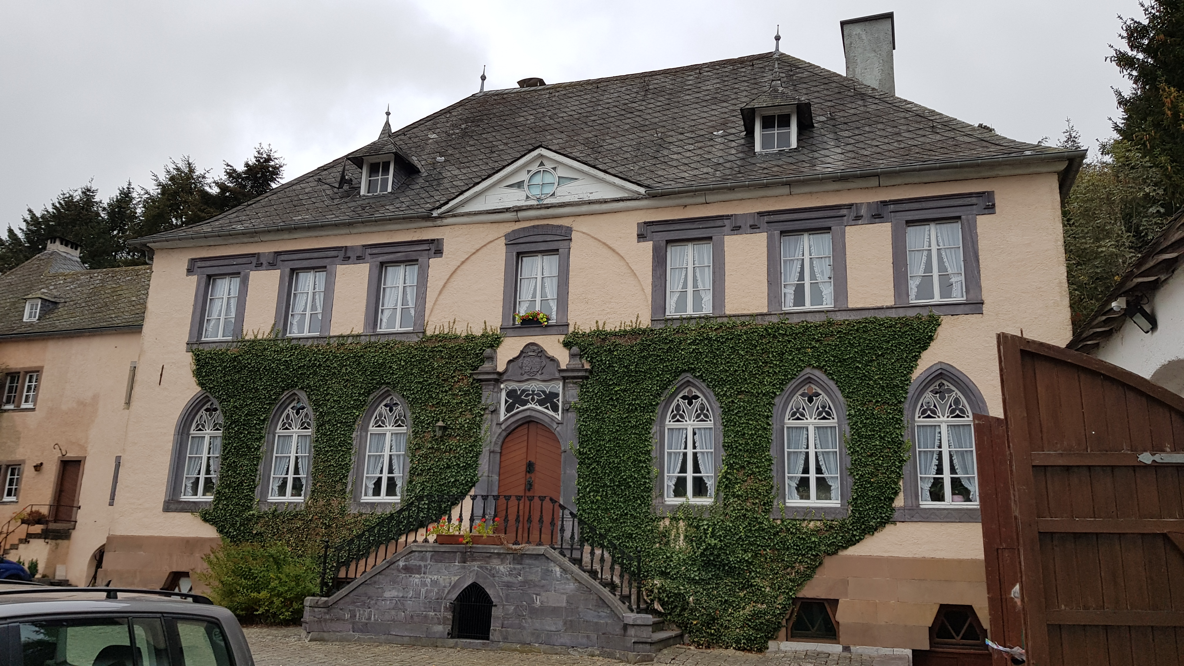 Schloss Wallerode, Wallerode, Sankt Vith, Belgien This photo of immovable heritage has been taken in the Walloon Region